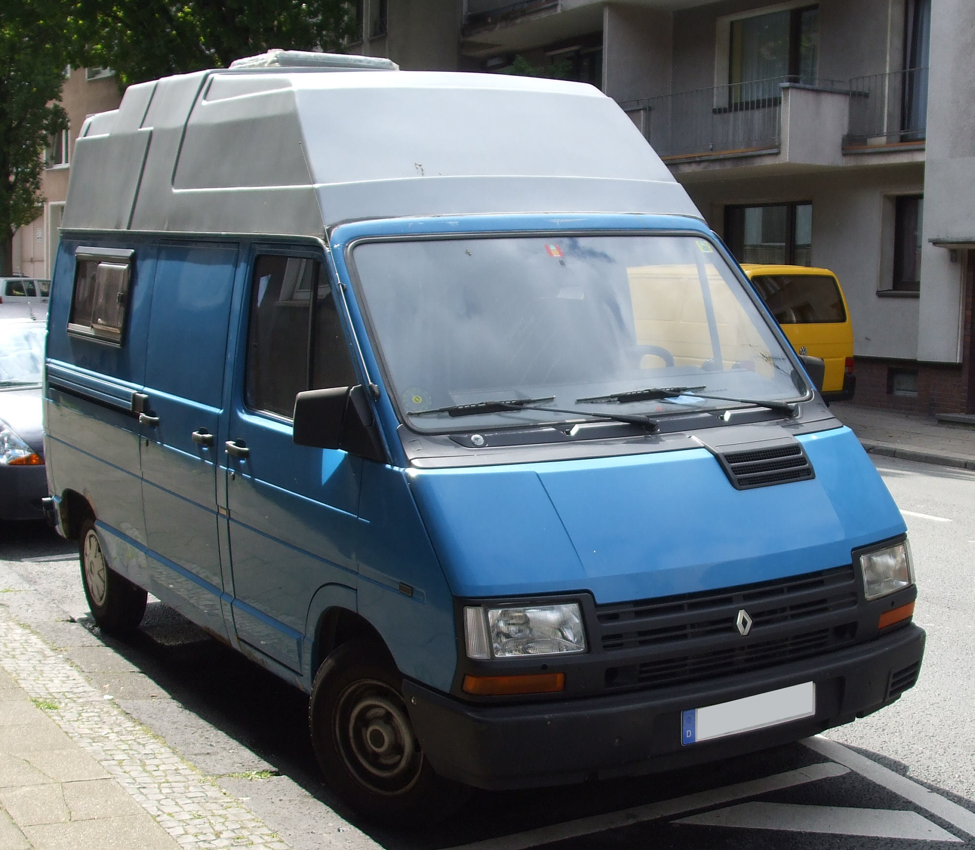 Wohnmobil auf Basis eines Renault Traffic